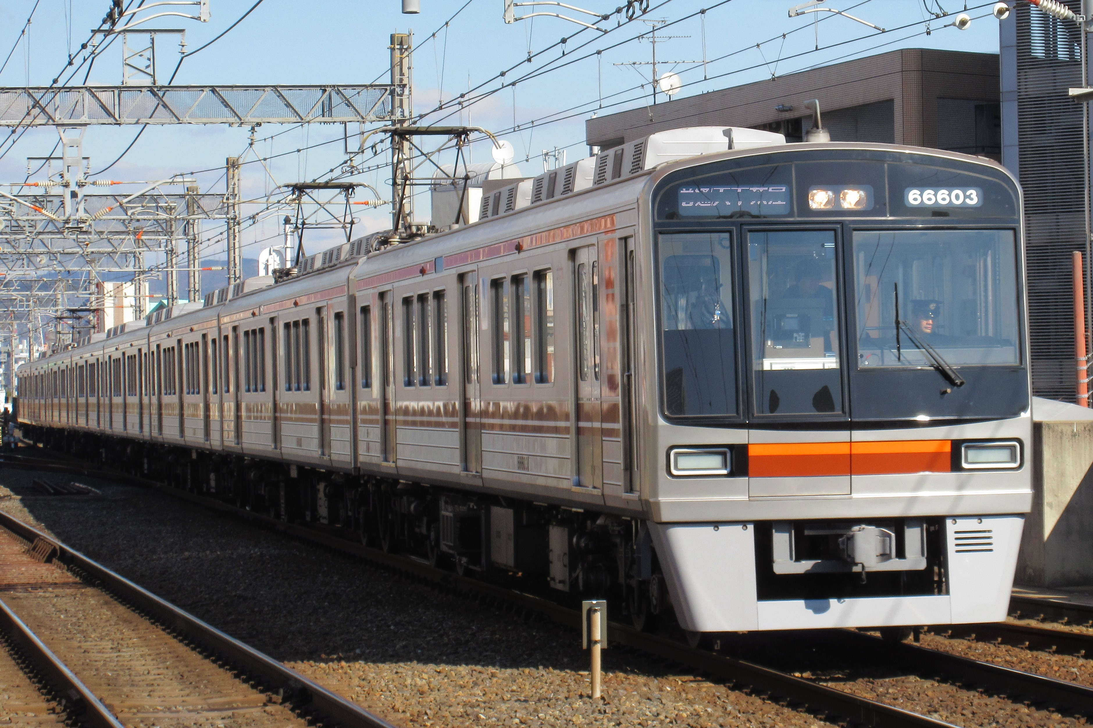 大阪市営地下鉄66603 (茨木市駅にて)